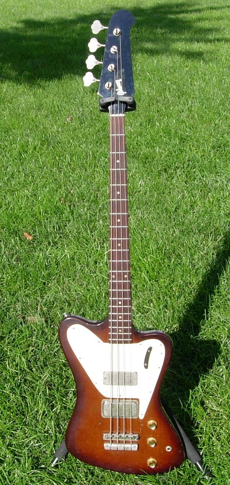 Бас-гитара Gibson Thunderbird